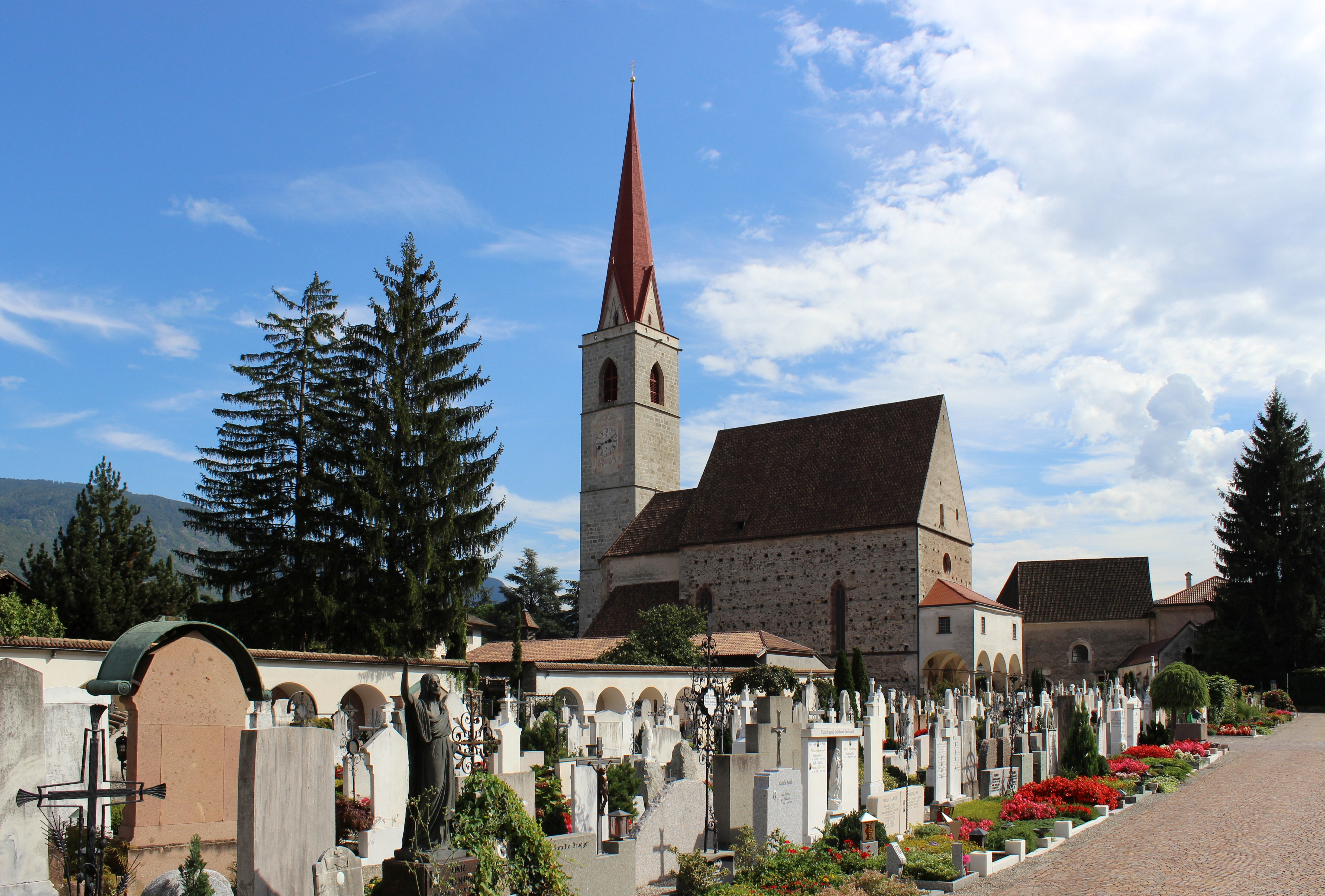 Alte Pfarrkirche Mariä Himmelfahrt mit Friedhof in Lana